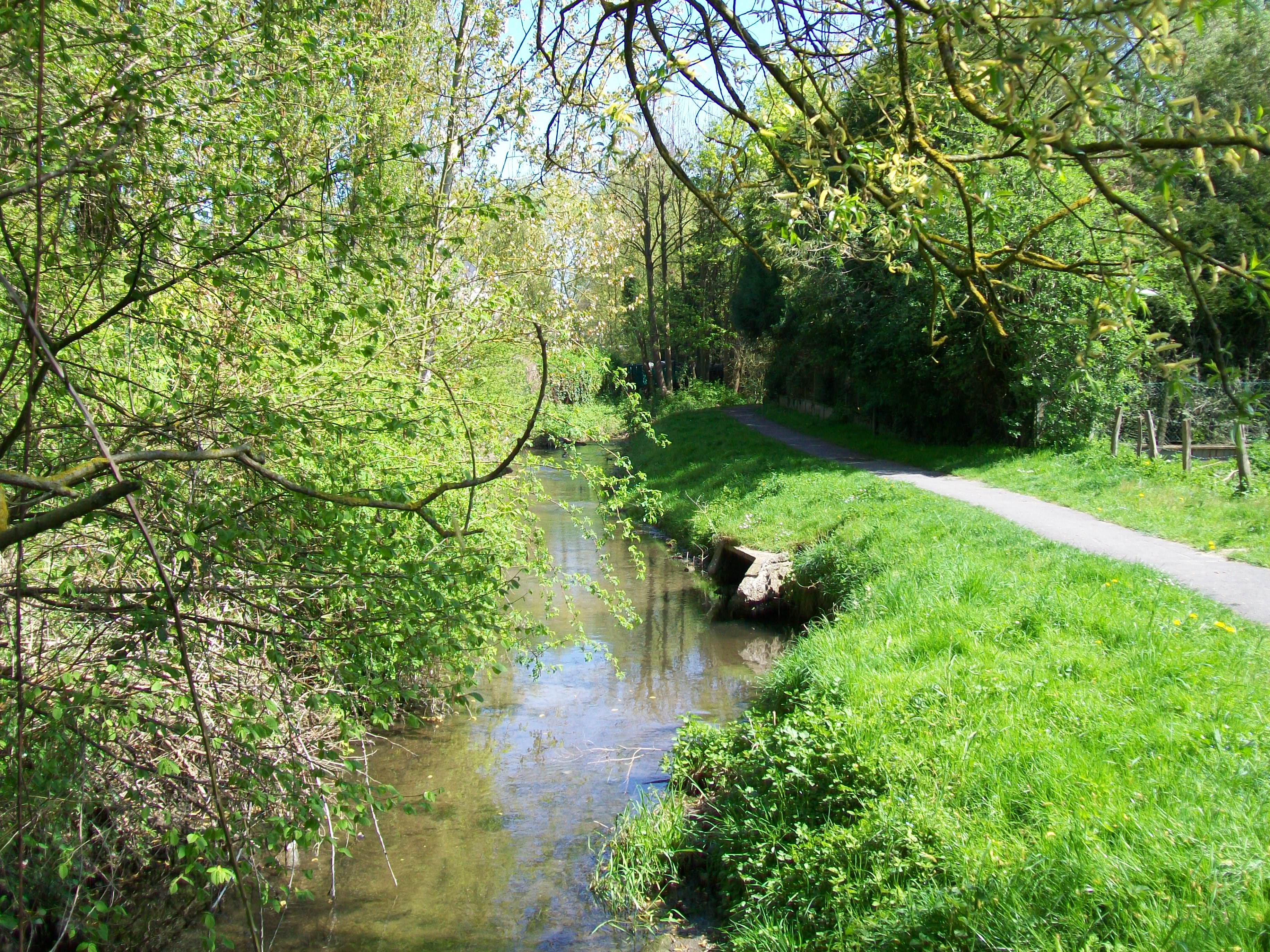 L'Aunette à Villevert, faubourg de Senlis, où un parc a été aménagé le long de son parcours.